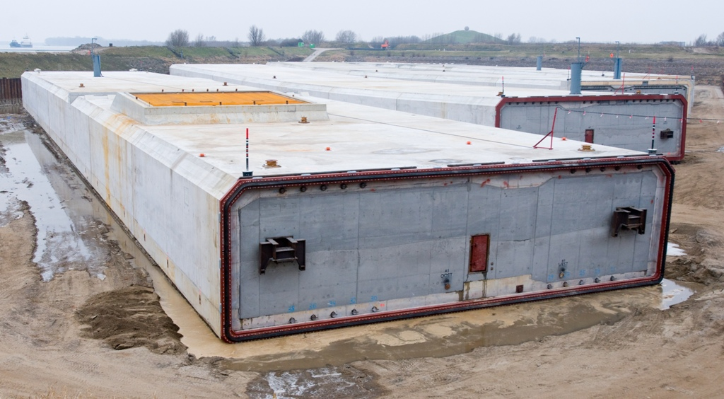 2011-01-31 Tweede Coentunnel Bouwdok Barendrecht